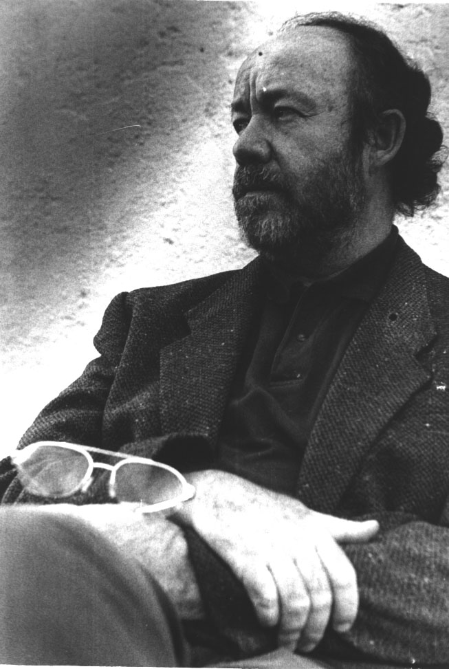 Alberto Blanco, Mexican Poet